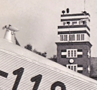 Alter Flughafen Dresden (Heller) mit der dem Flugfeld zugewandten Nordwestfront des Abfertigungsgebäudes; in unmittelbarer Nähe des heutigen S-Bahn-Haltepunktes „Industriegelände“; ungefähr 30-40 m hinter dem Gebäude und parallel dazu verlaufen die Bahngleise